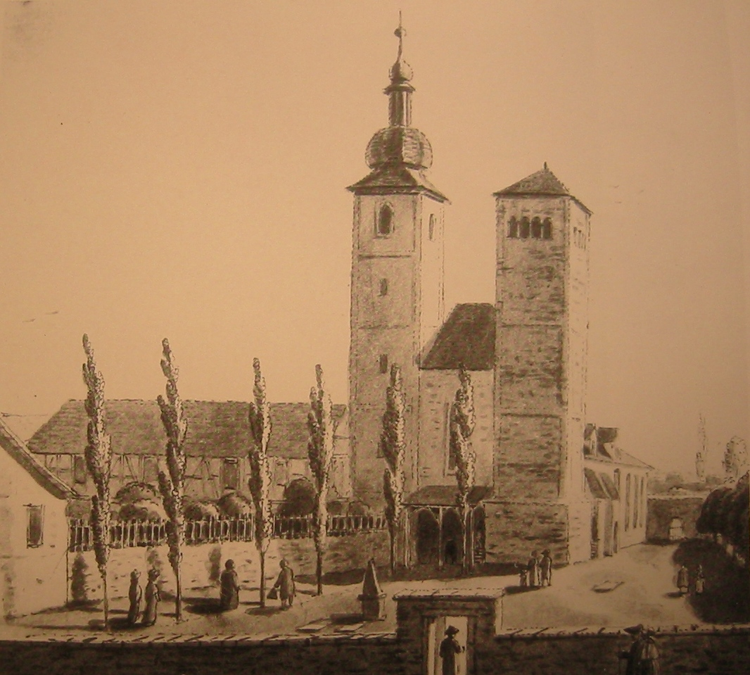 Reglerkirche Erfurt before 1800